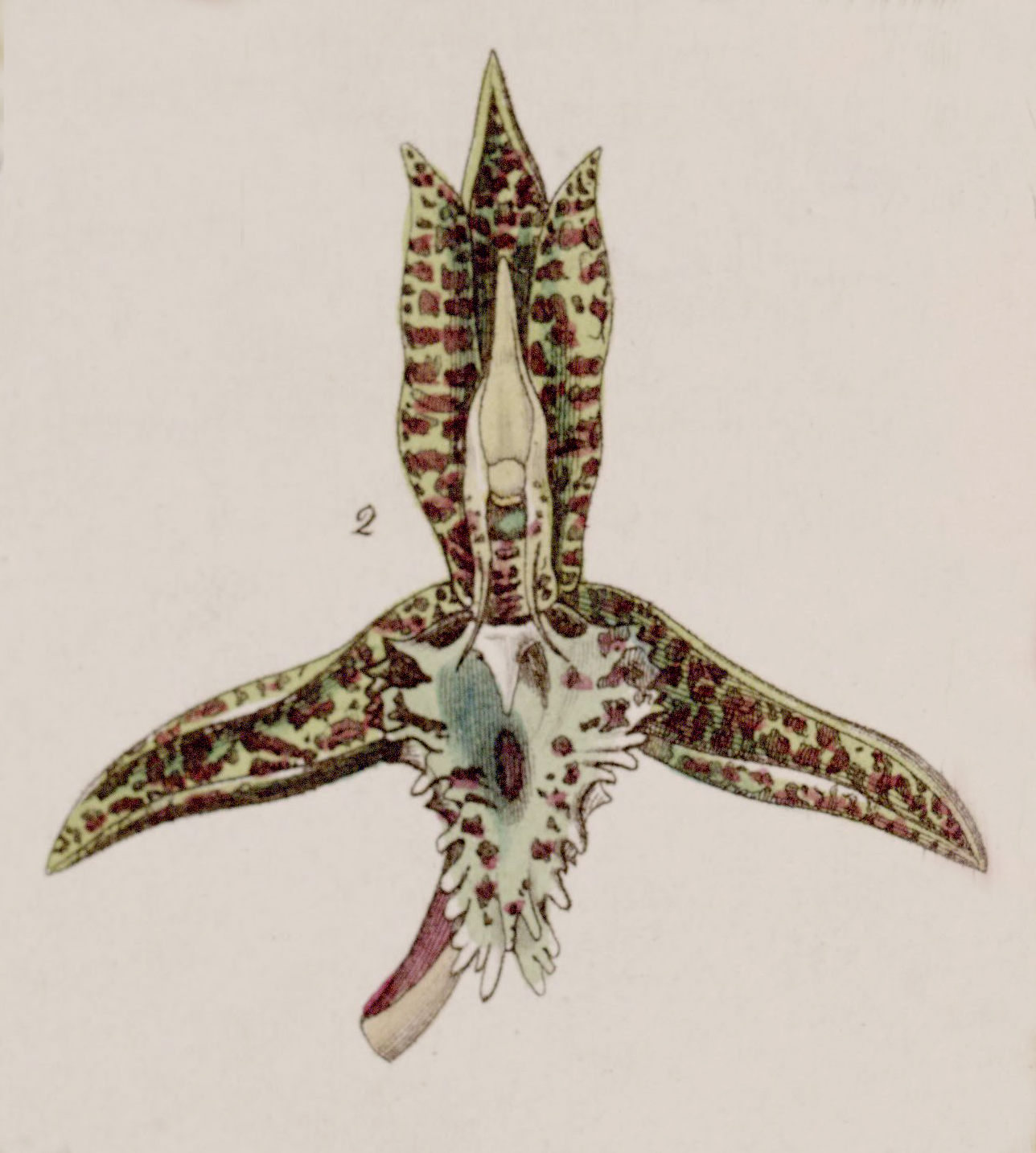 Catasetum cristatum (as syn. Catasetum cornutum)